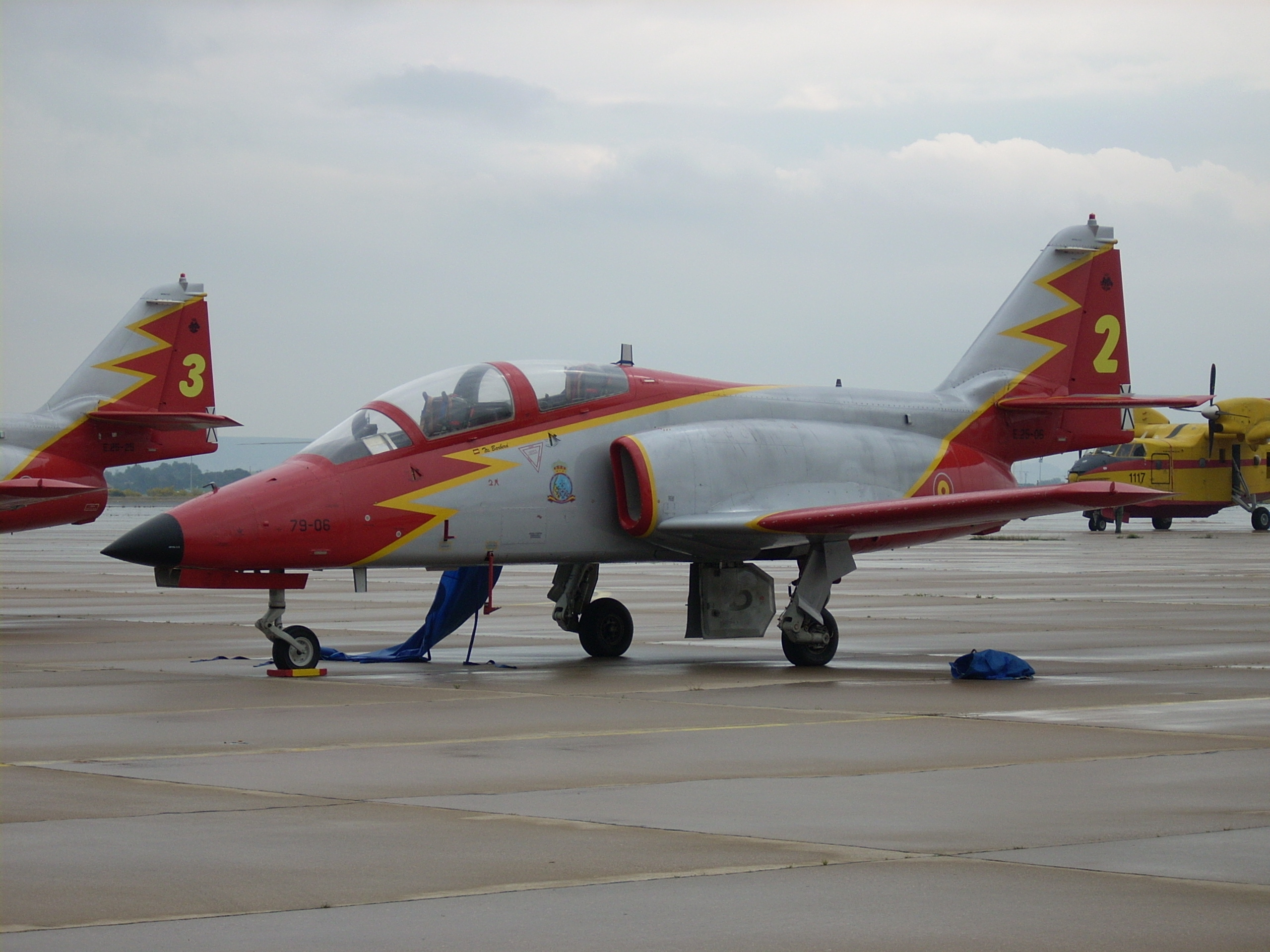 Entrenador aeronautico a reacción, modelo C-101, fabricado por CASA, ejemplar perteneciente al Ejercito del Aire, patrulla Aguila